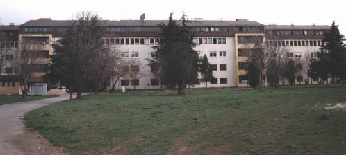 Zgrada hirurgije VB Niš